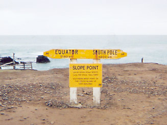 Señal en Slope Point. Incluye la distancia al ecuador y al Polo Sur